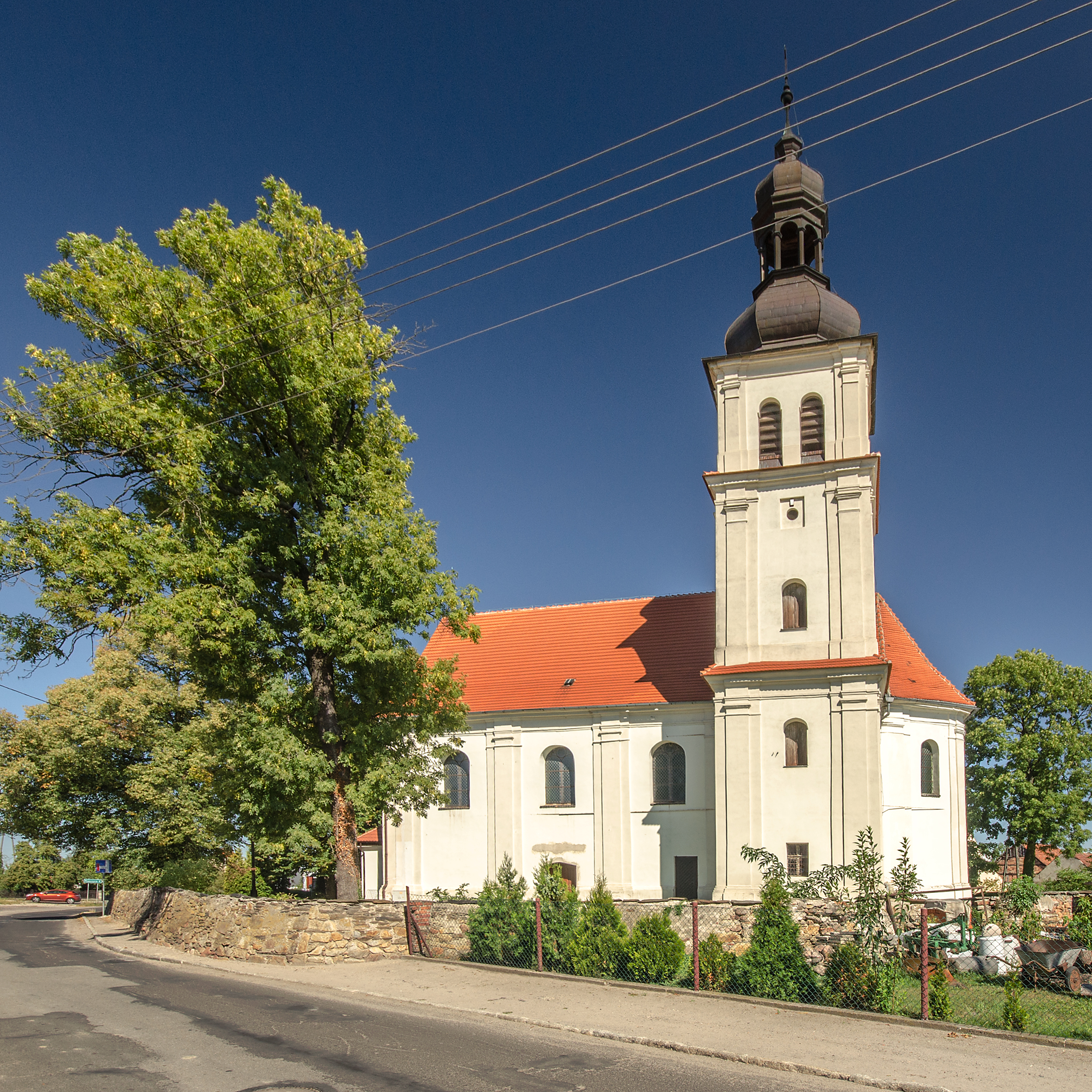 Chomiąża, kościół par. p.w. św. Michała, XIV, XVII